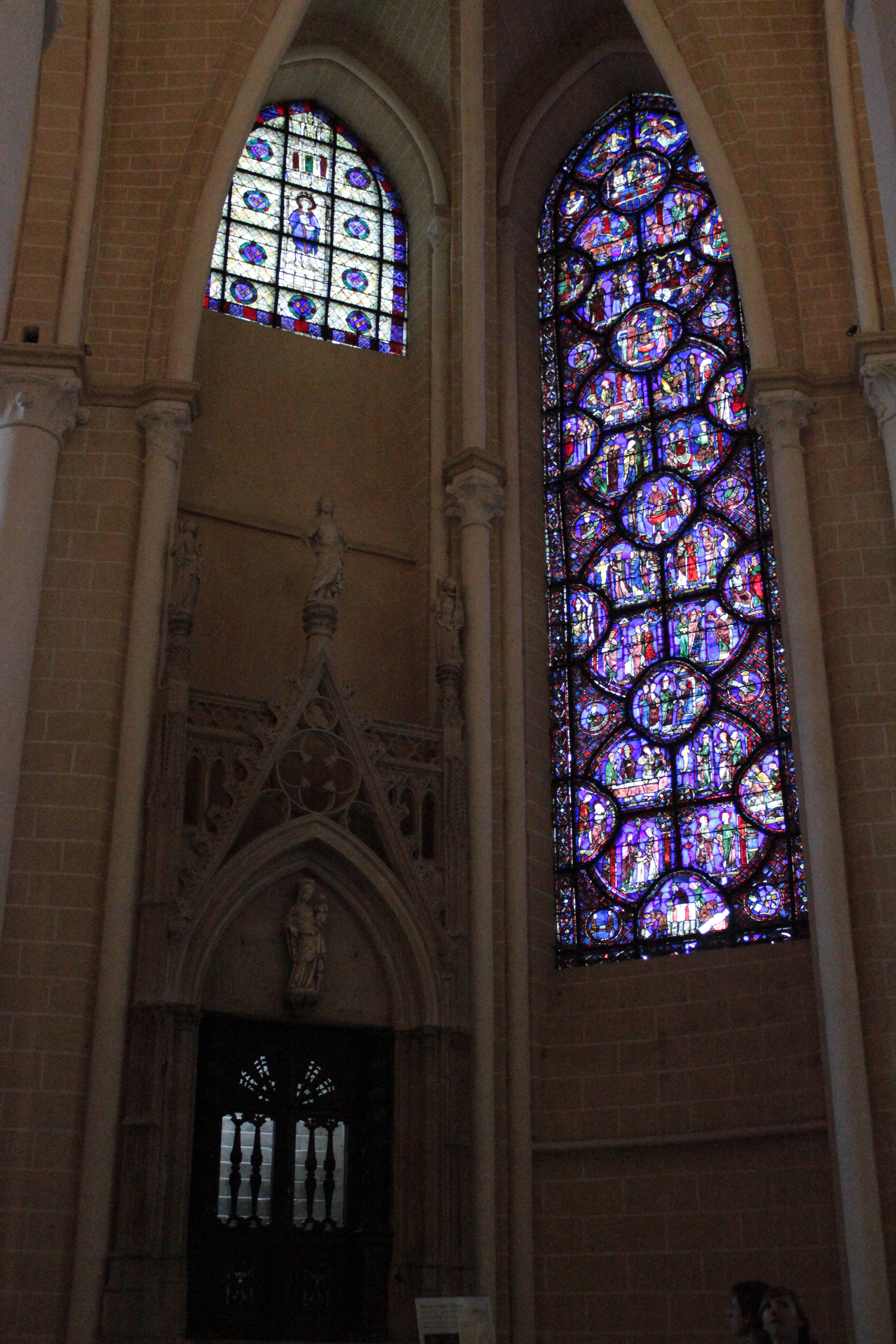 vitrail de Chartres, Eure-et-Loir, France.